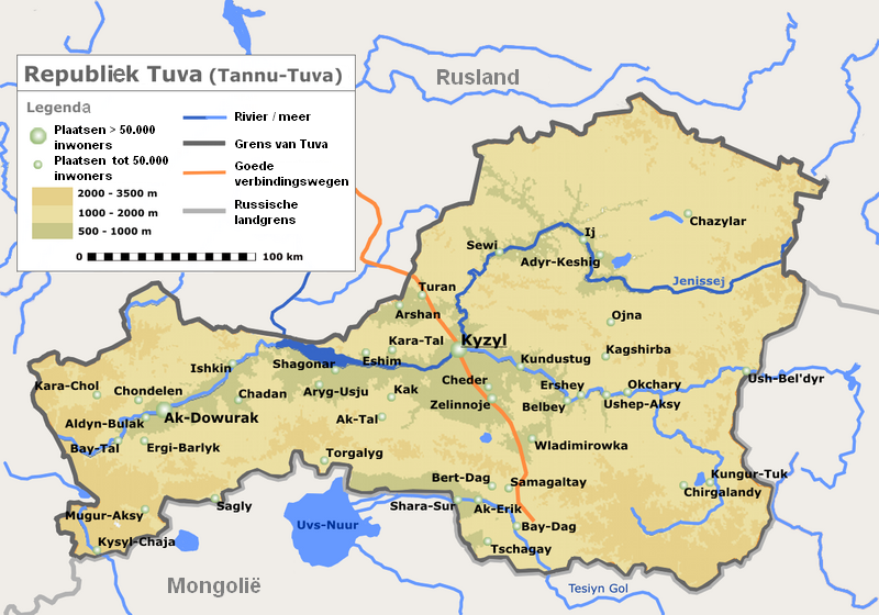 Republiek Tuva